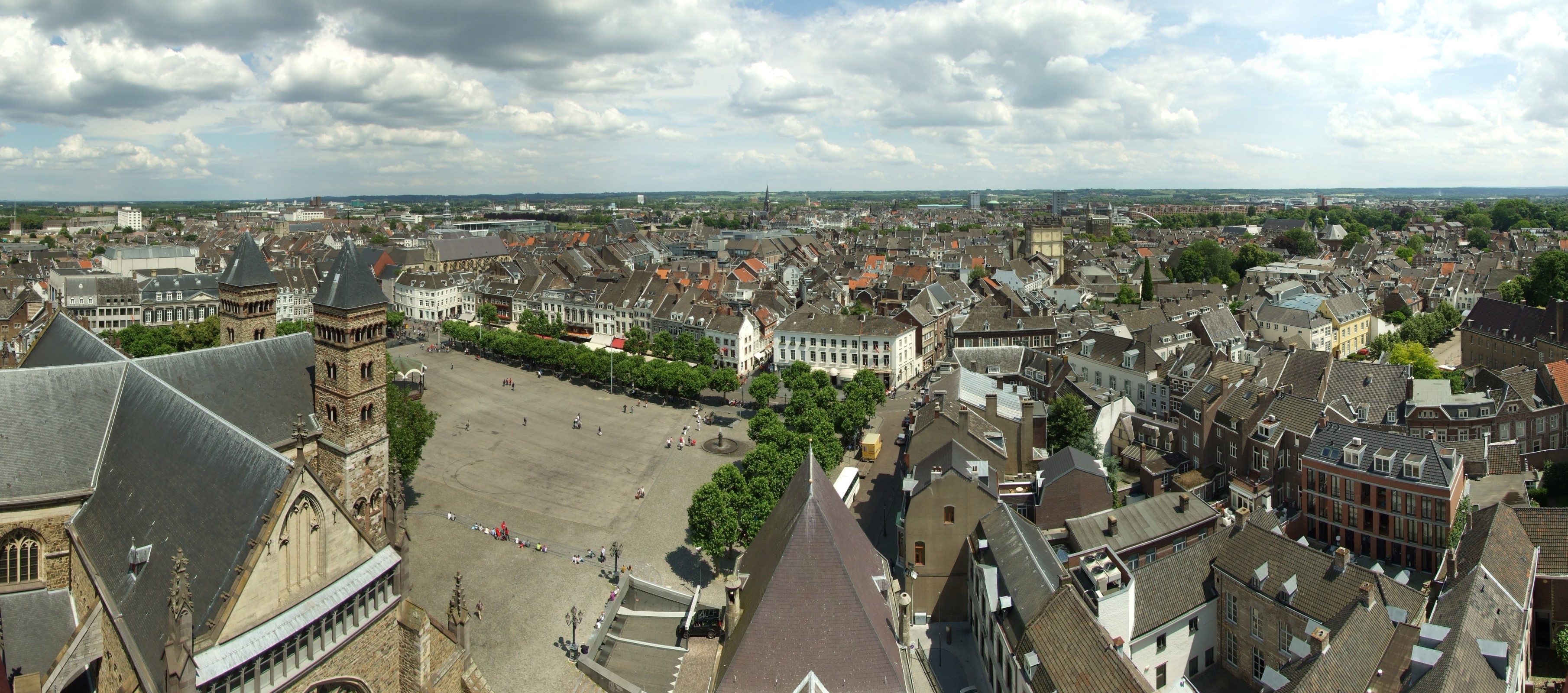 Panorama von Maastricht. Aufgenommen vom Sint Janskerk-Turm